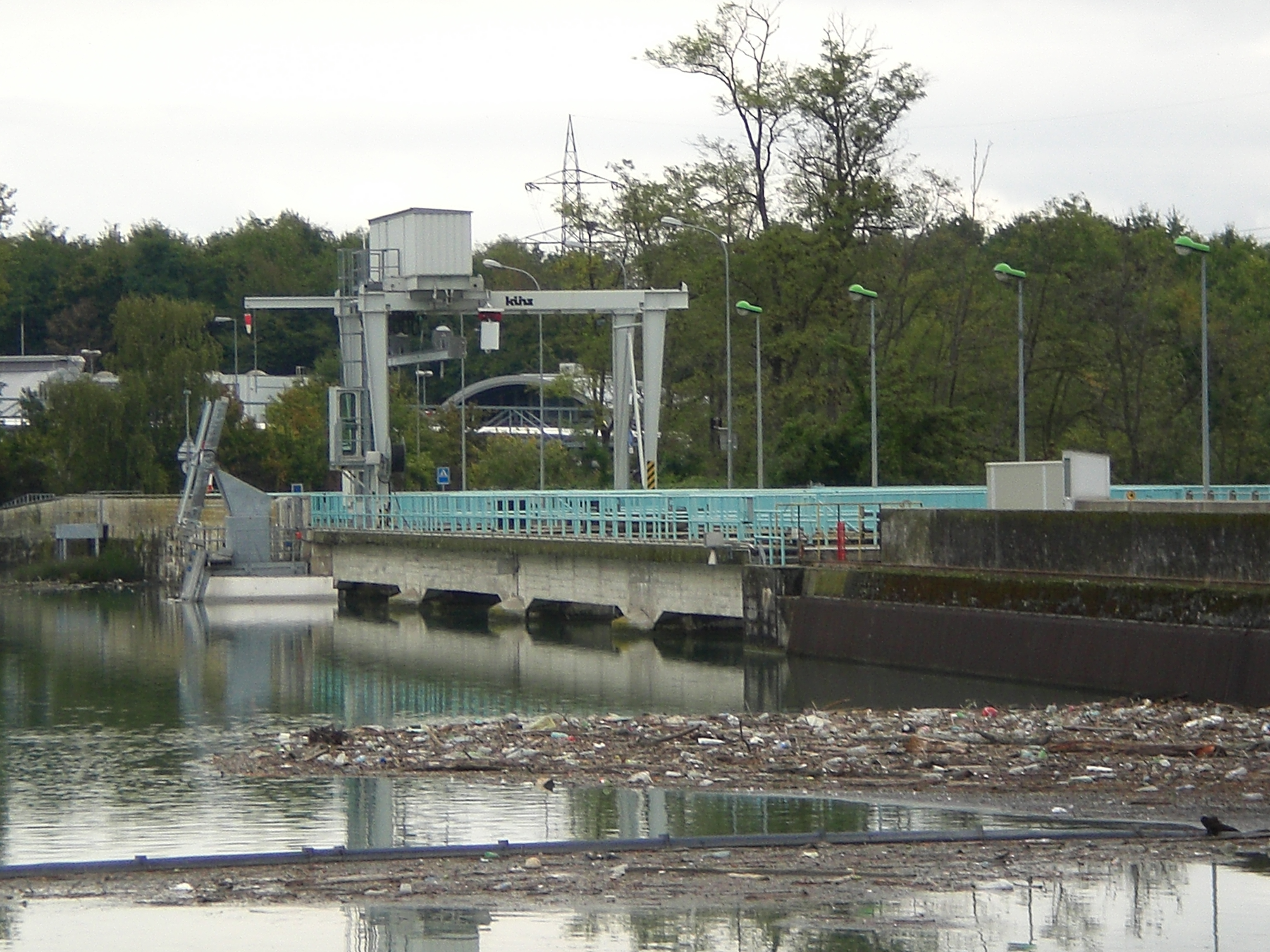 Barrage et pont de Verboix